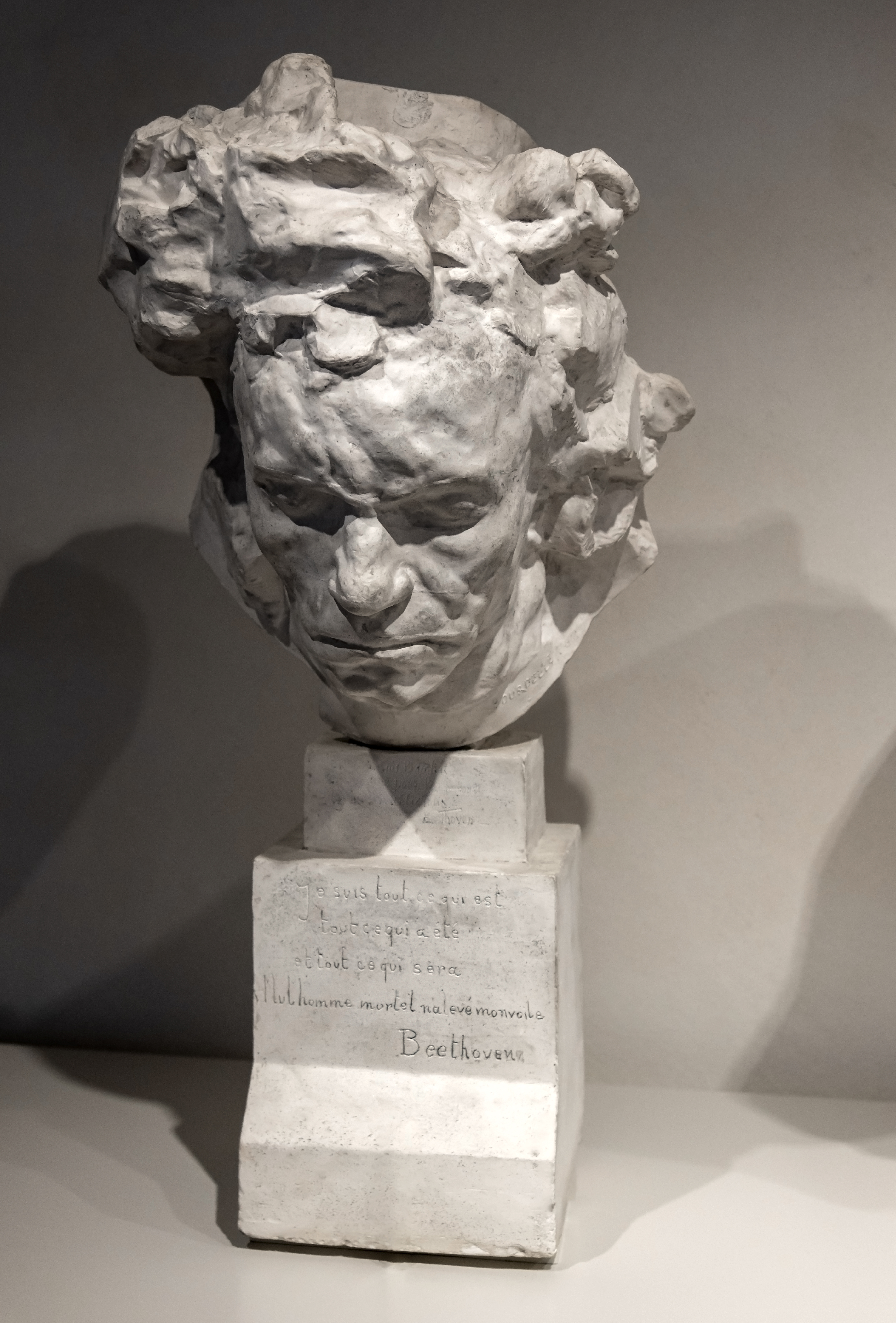 Version réduite de l'exemplaire en bronze dit du : Metropolitan Musemum pour la tête et du Beethoven aux grands cheveux de 1891 pour l'inscription.